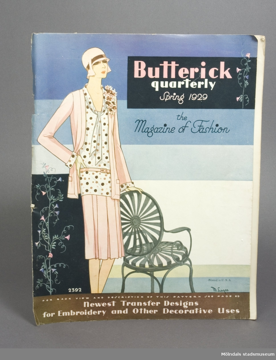 En modetidning från 1929 av The Butterick Publishing Company.